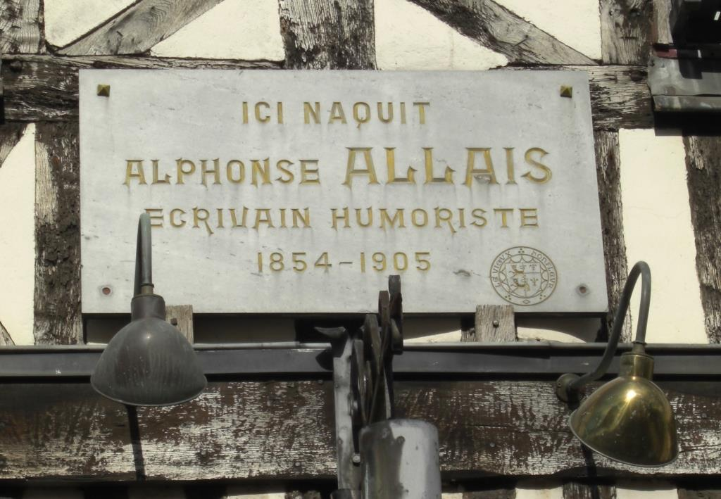 Tafel am Geburtshaus des Schriftstellers, Journalisten und Humoristen Alphonse Allais (1854-1905) in Honfleur